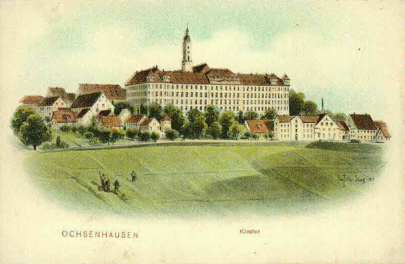 Ansichtskarte von Eugen FelleMotiv: Ochsenhausen